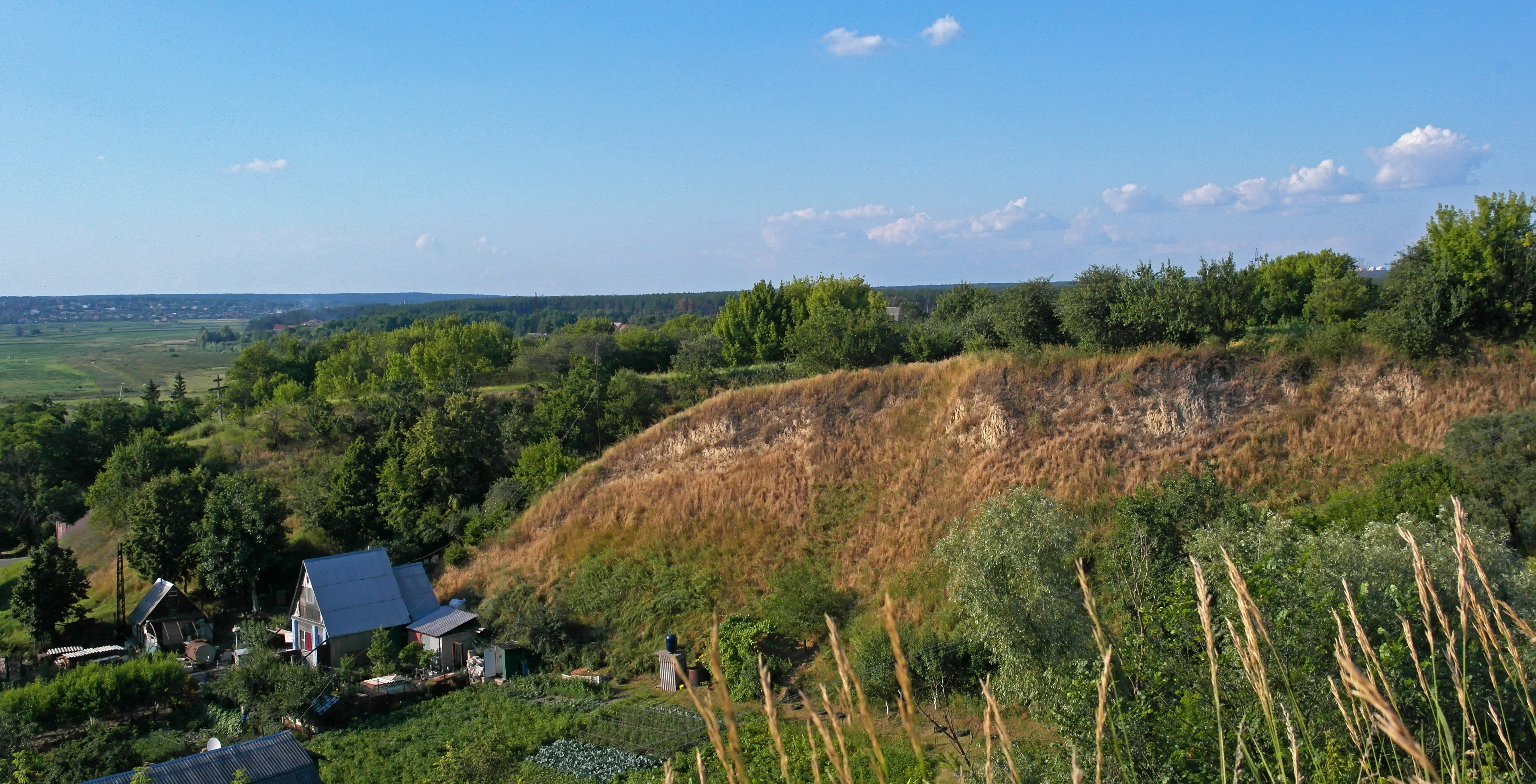 «Білогородський горб», Києво-Святошинський район, Білогородська сільська рада